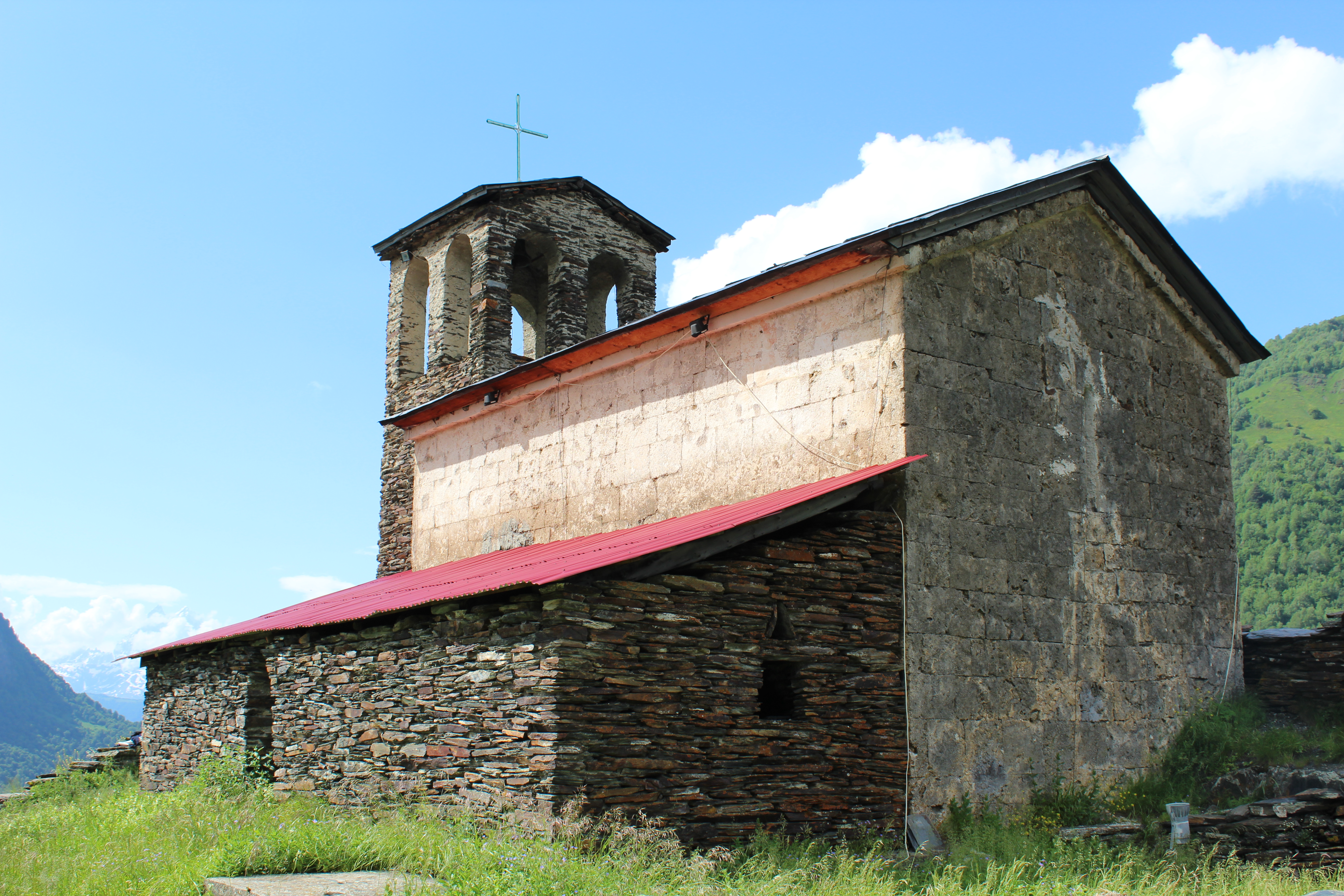 წმ. კვირიკეს და ივლიტას ეკლესია „ლაგვირკა“